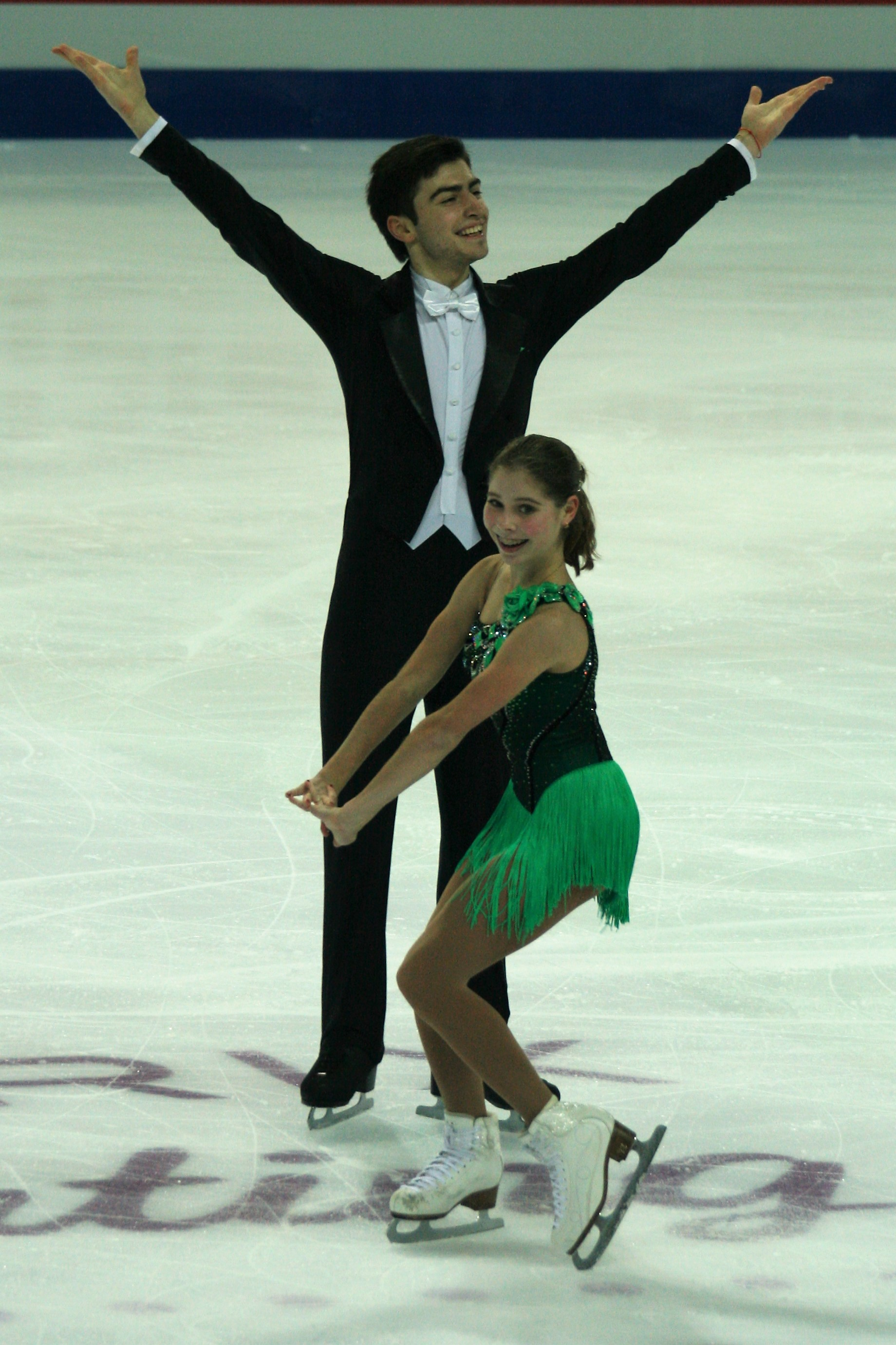 Анастасия Мишина / Владислав Мирзоев (Россия) на финале Гран-при по фигурному катанию среди юниоров 2016-2017